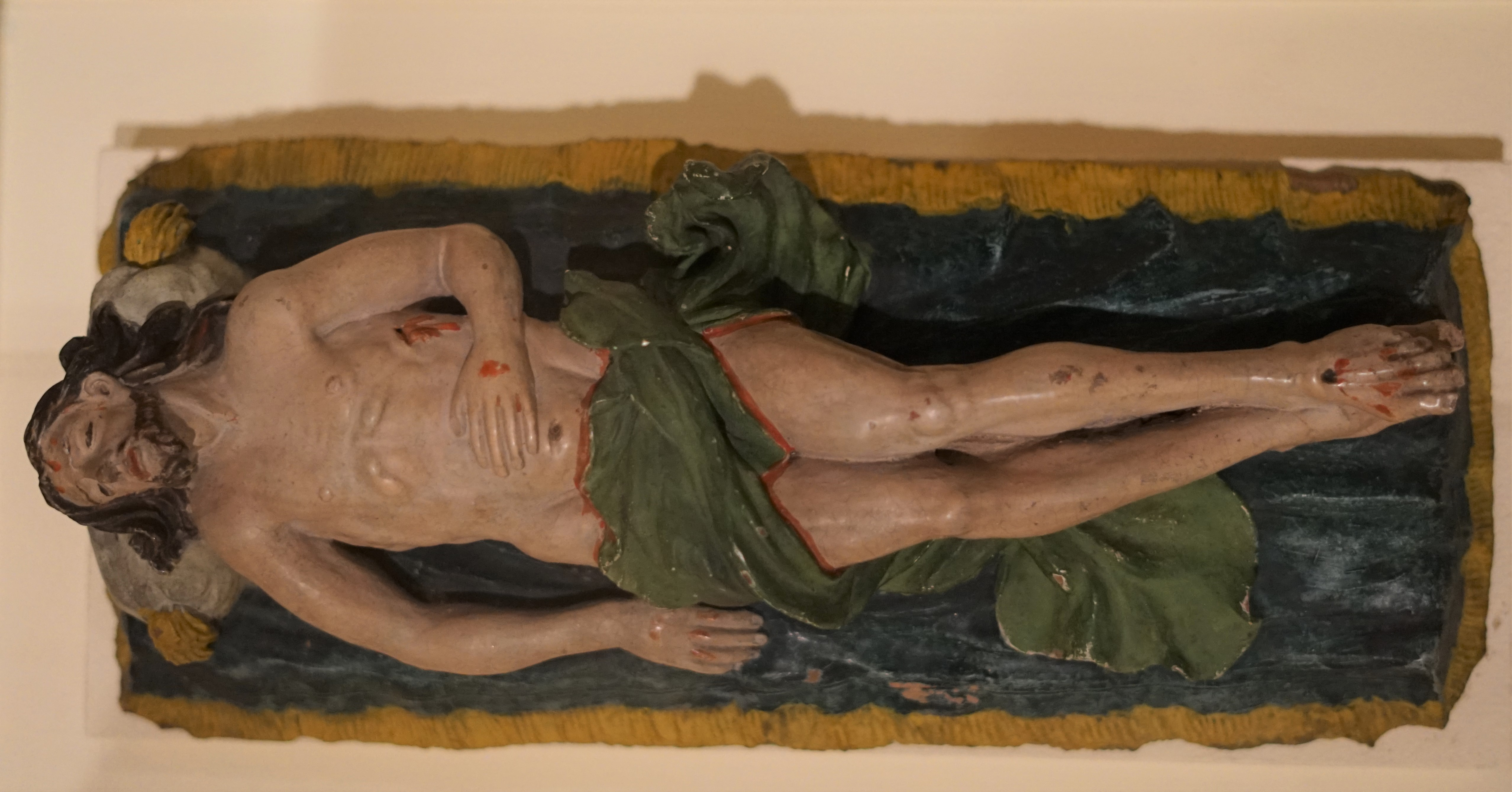 Louis-Sébastien Lysner, Christ gisant, terre cuite modelée,fin XVIIIe, musée Déchelette, Roanne